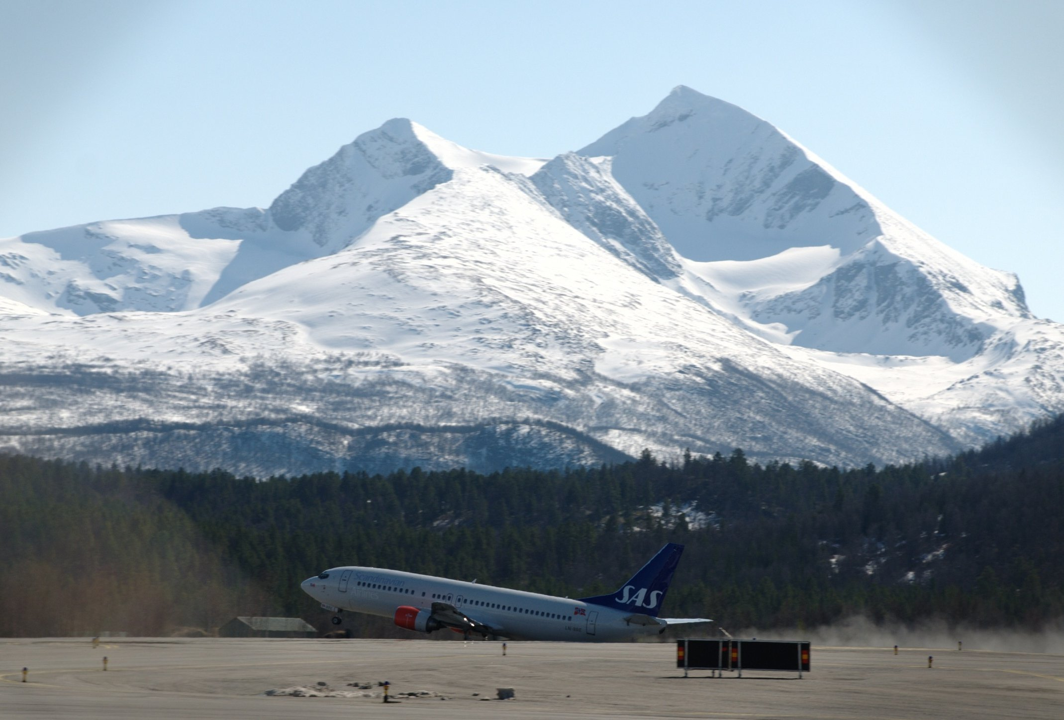 ..der dro flyet vårt og fortsatt ingen buss fra Narvik i sikte.